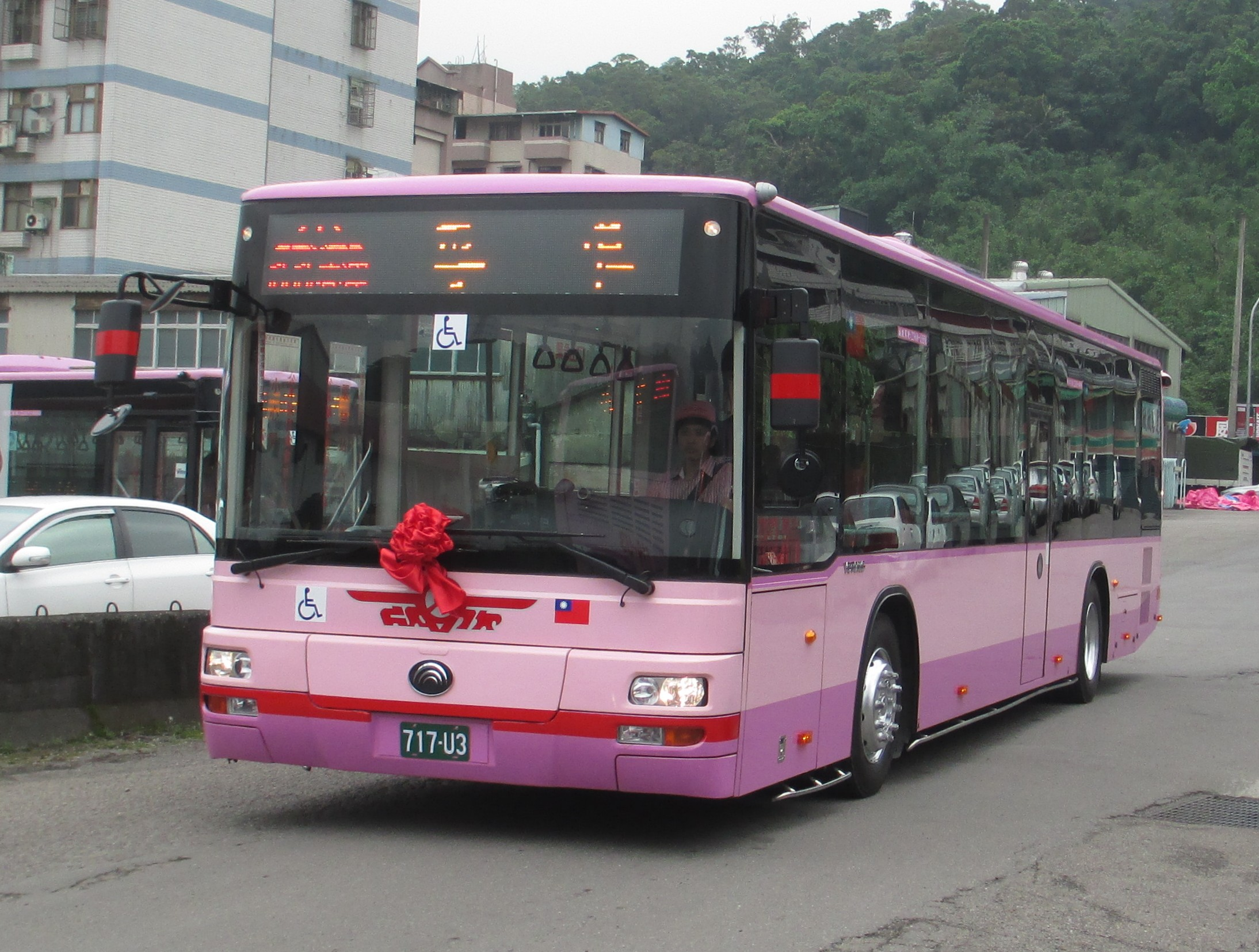 欣欣客運2015 YUTONG ZK6128HG 717-U3